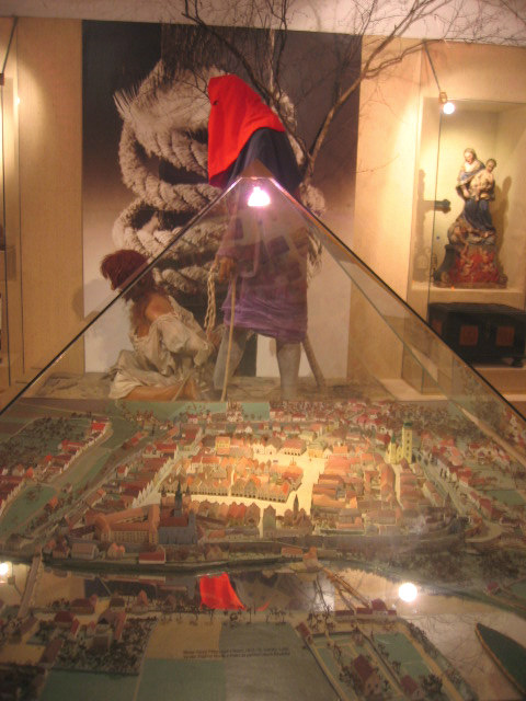 modelo de la urbo Písek (Sudbohemia regiono, Ĉeĥio) en Muzeo de la regiono Prácheň kunaŭtoro - ĉeĥa esperantisto Libor Křivánek, longjara dungito de la muzeo kaj prezidanto de E-klubo en Písek Kategorio:Bildoj de ĉeĥaj urboj